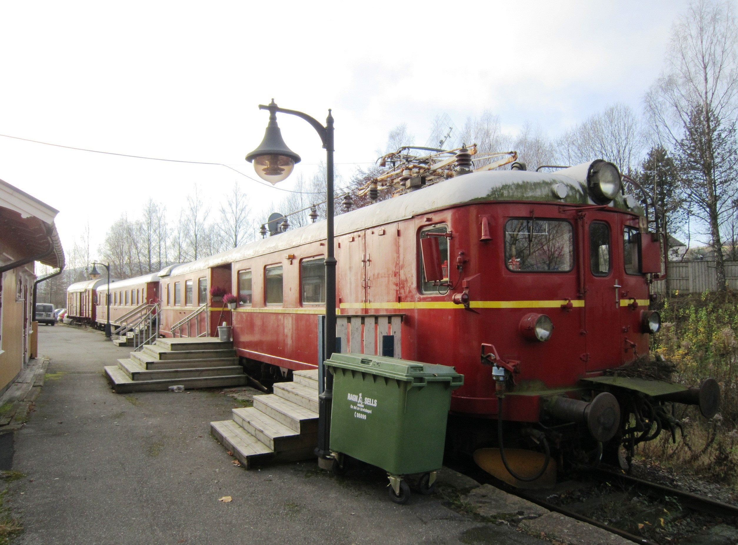 Tog ved Lier gamle stasjon i Lierbyen